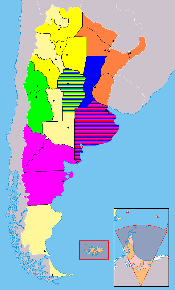 Distribución de los equipos del Torneo Argentino B Temporada 2007/08 por provincias y zonas, basado en Argentina - Político.png. Fucsia para la Zona Sur, rojo para la Zona Buenos Aires, azul para la Zona Centro, verde para la Zona Cuyo, amarillo para la Zona Norte y naranja para la Zona Litoral.